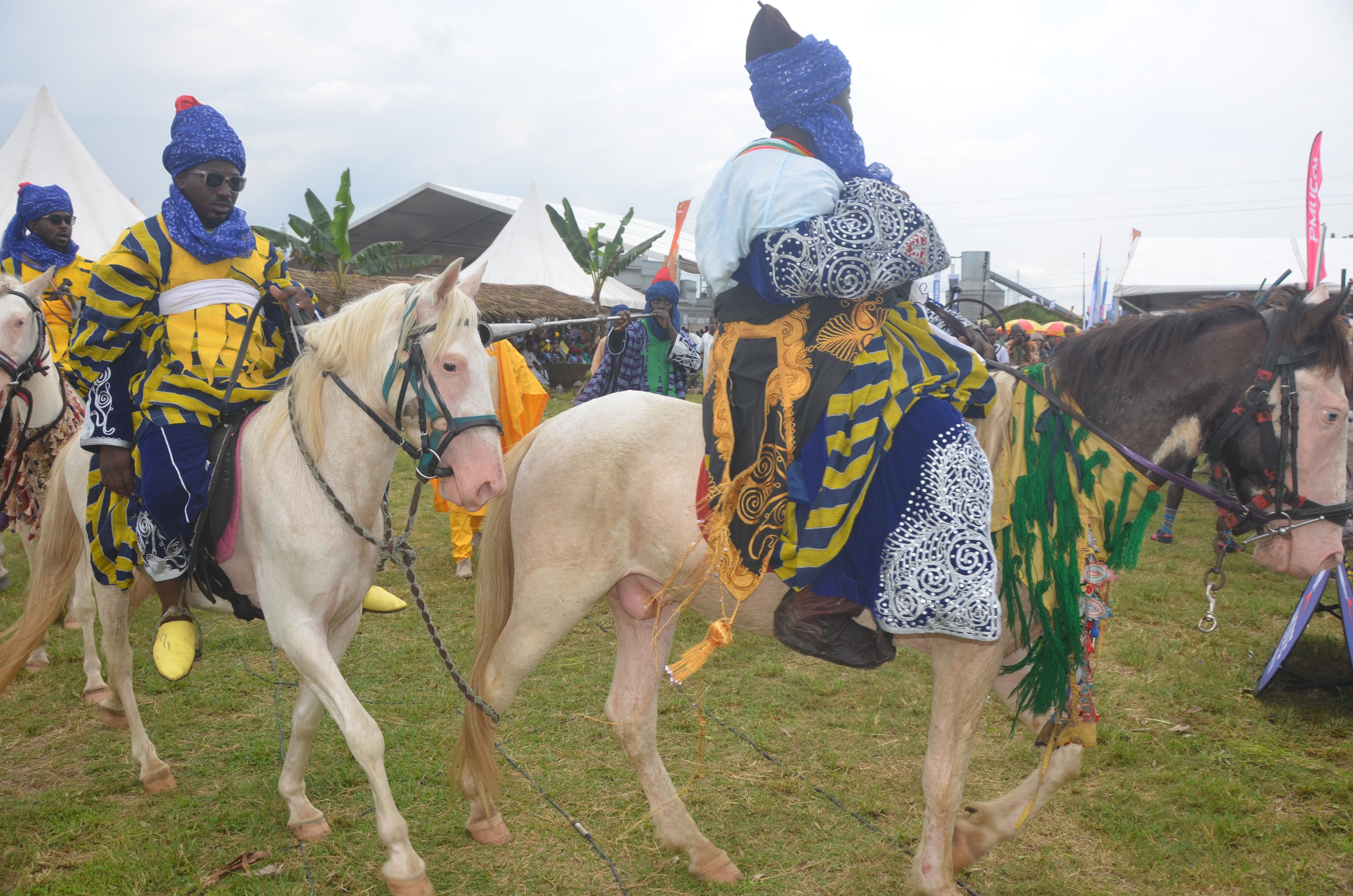 Les Cavaliers représentants la région du Nord du Cameroun, pendant le Ngondo à Douala This is an image with the theme "Africa on the Move or Transport" from: Cameroon